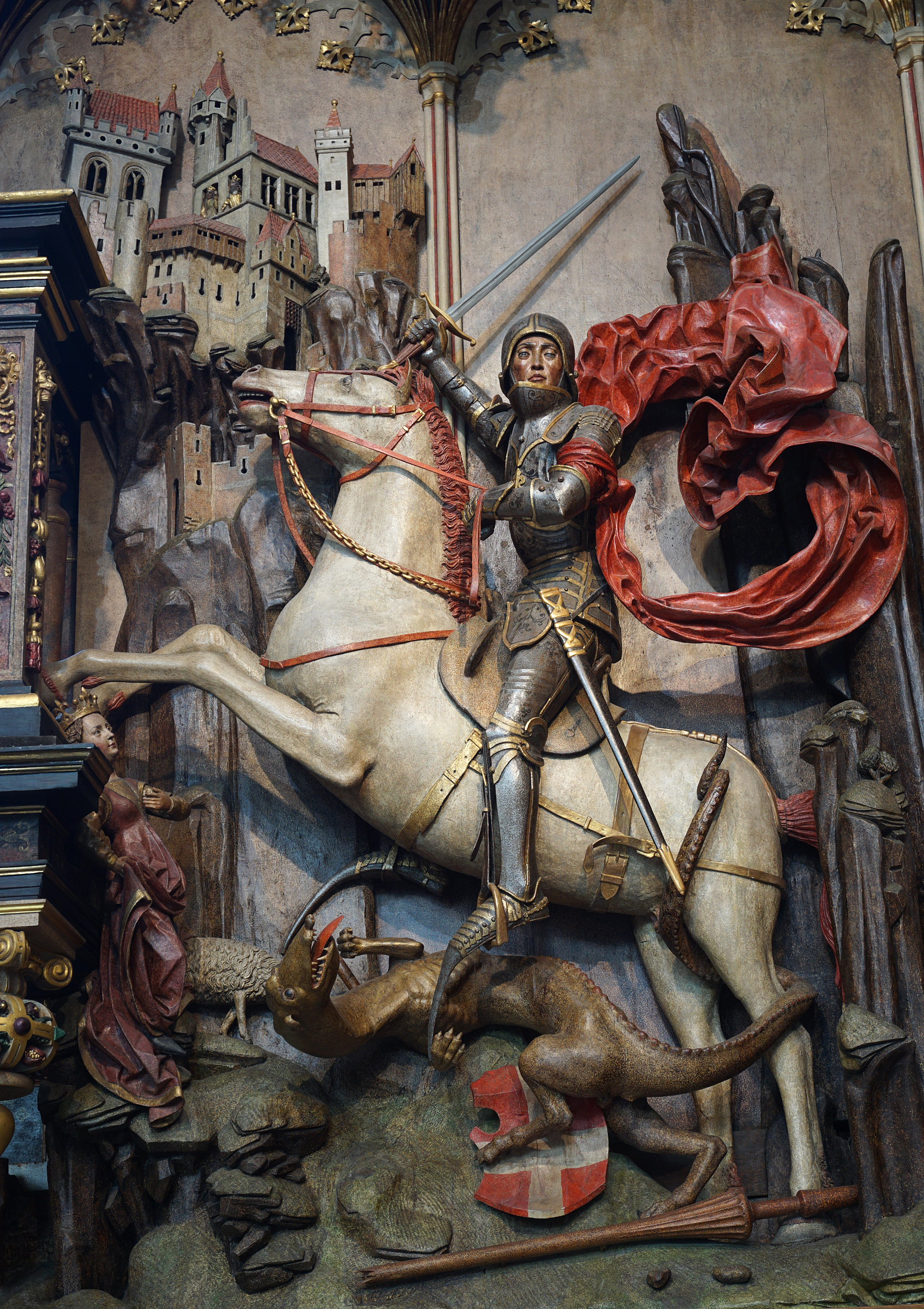 Rzeźba świętego Jerzego zabijającego smoka, 1481–1487, Dwór Artusa w Gdańsku